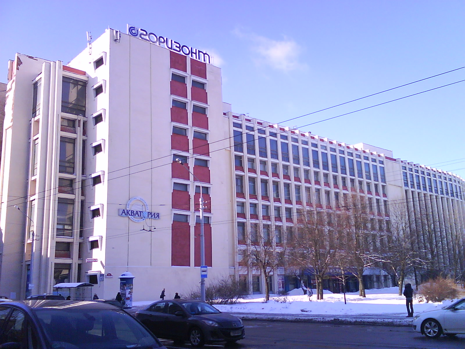 завод Горизонт